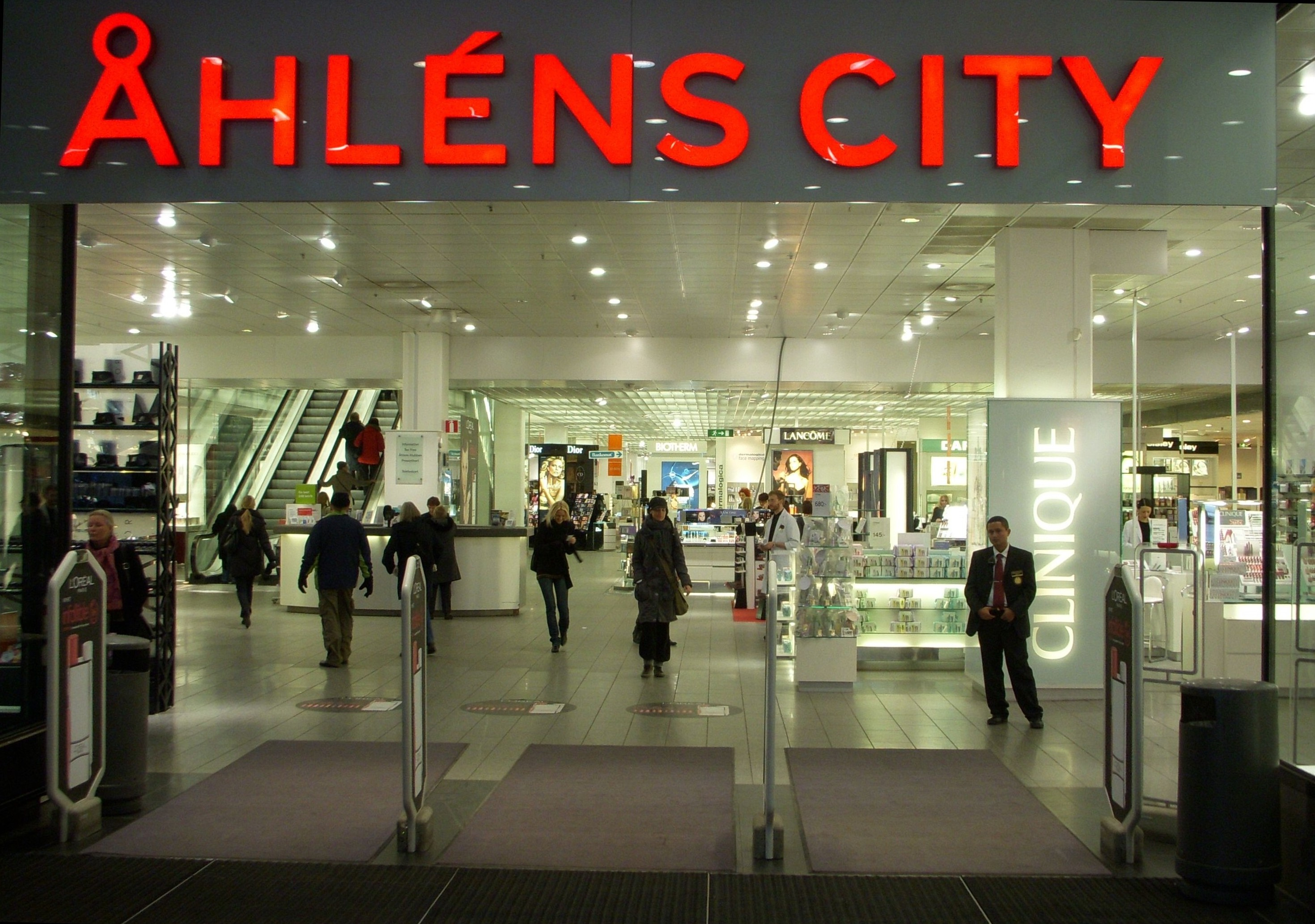 Entré till Åhléns City i Stockholm